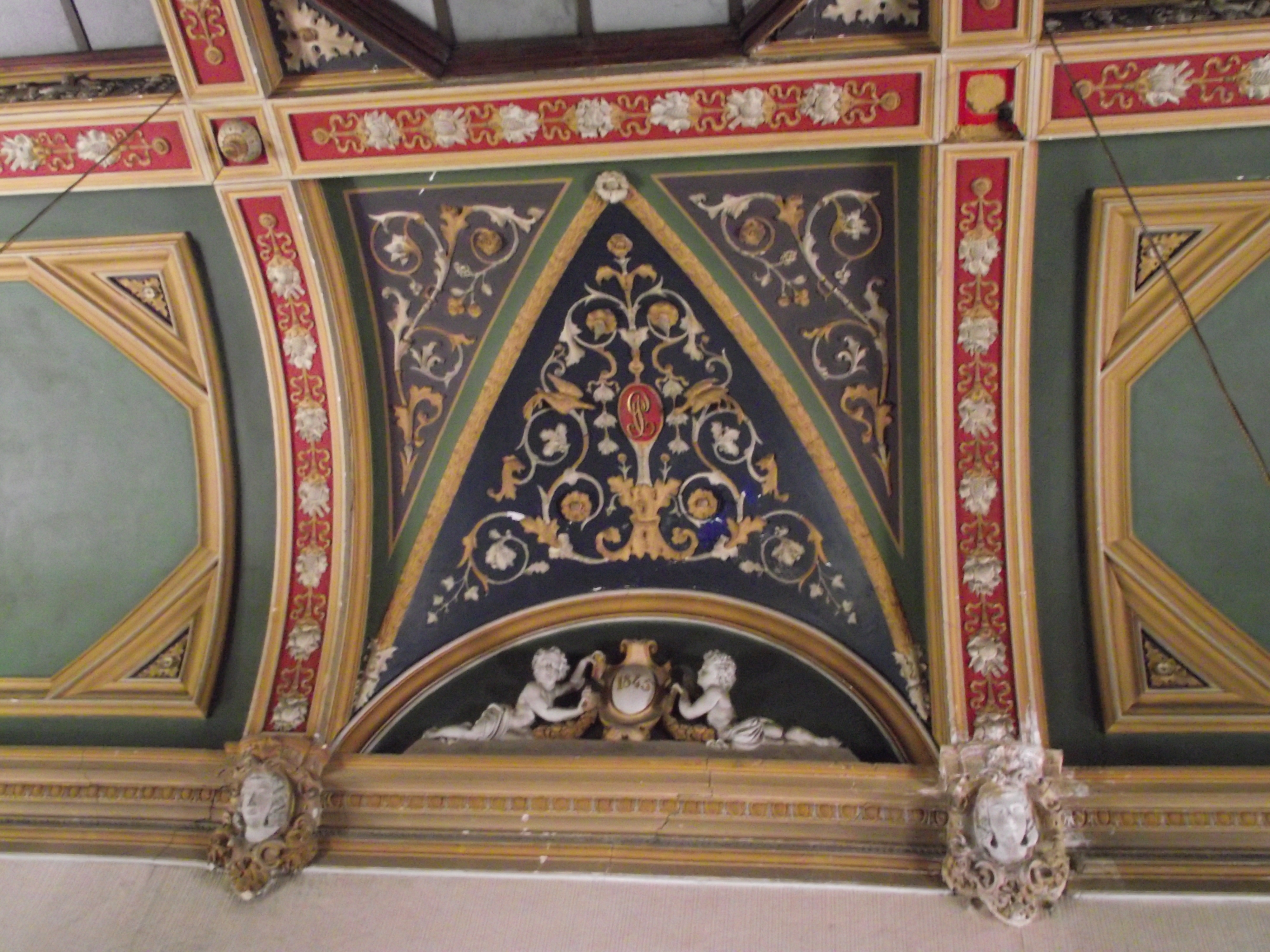 Détail du plafond de la salle Chambert-Péan ("Belle galerie") - Décor de rinceau au chiffre de J.S. Chambert-Péan et écu portant la date de 1845 - Bâtiment Hugo (ancienne villa Saint-Lazare), lycée Augustin-Thierry